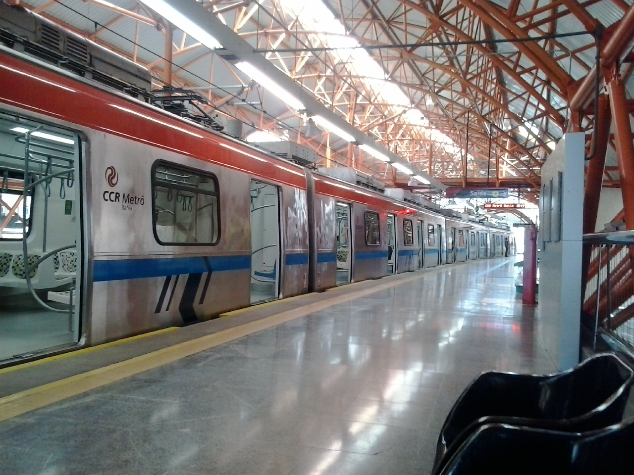 Trem na plataforma do sentido Lapa na Estação Brotas do Metrô de Salvador.